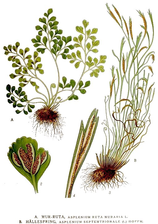 Asplenium ruta-muraria L., Asplenium septentrionale (L.) Hoffm. Original Description A. Mur-ruta, Asplenium ruta-muraria L. B. Hällespring, Asplenium septentrionale (L.) Hoffm.